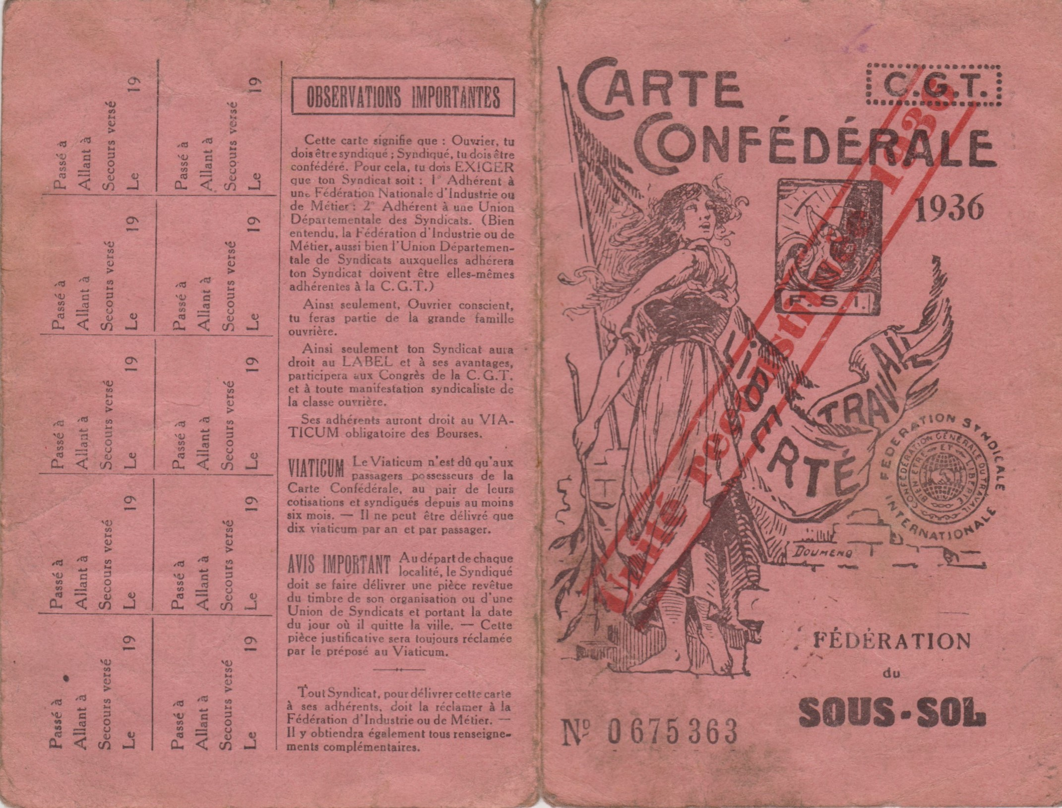 A noter l'empreinte transversale : "Unité reconstituée". Carte d'adhérent à la Fédération des mineurs CGT (France) pour l'année 1936. (recto). La CGT fait alors partie de la Fédération syndicale internationale comme l'indique le logo.